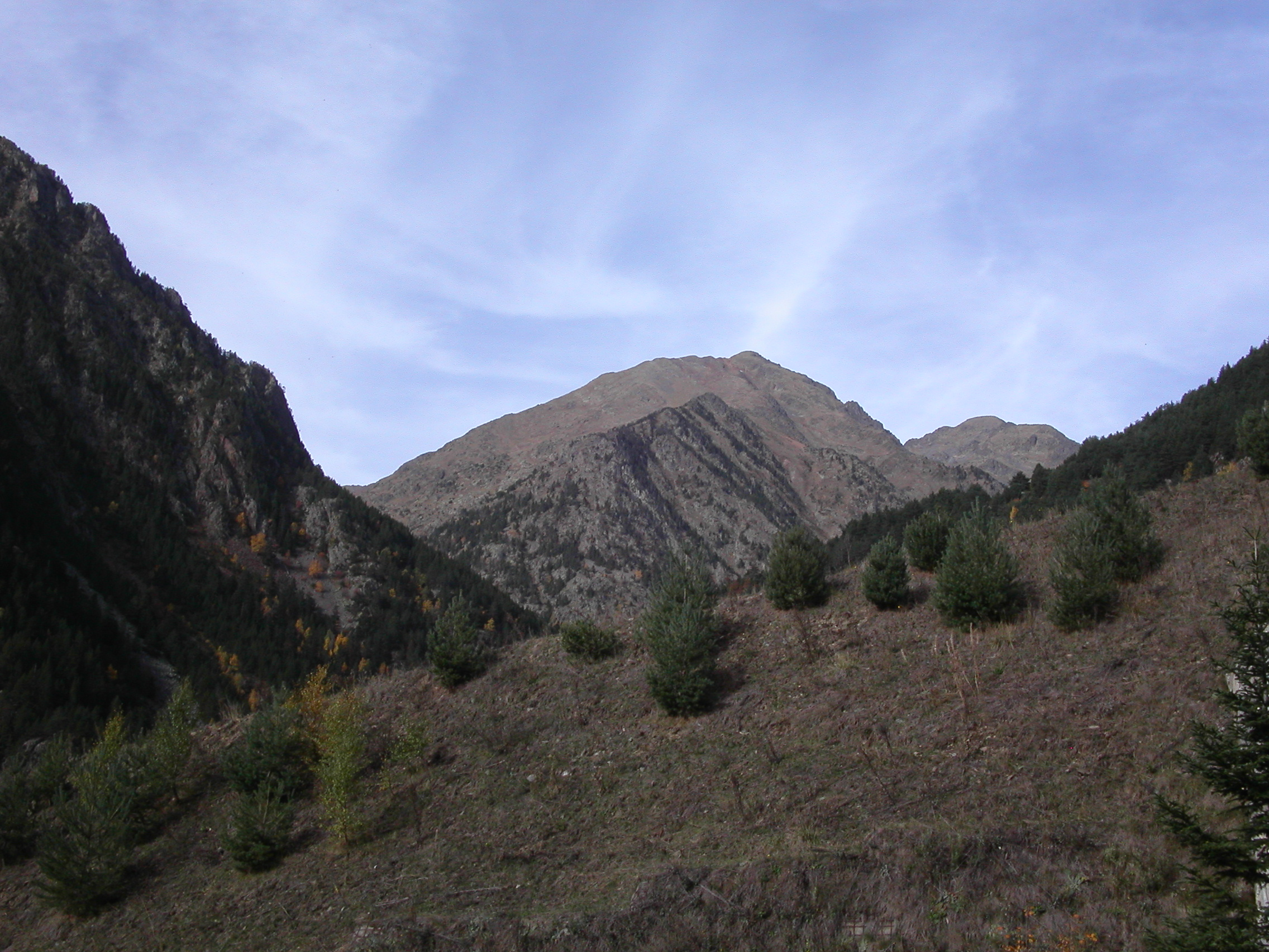 Comapedrosa desde Arinsal, Andorra